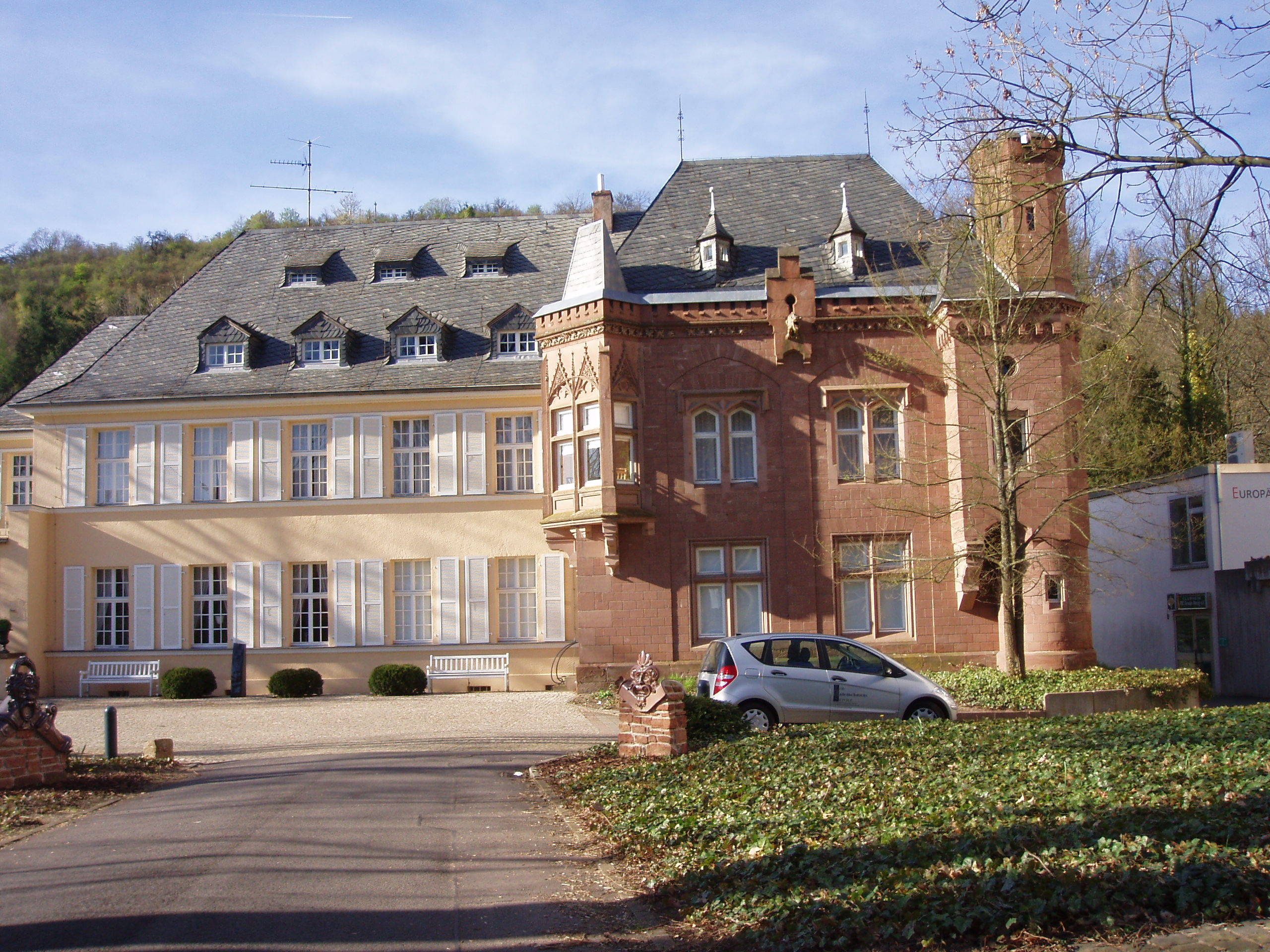 Schloss Fellenberg in Merzig